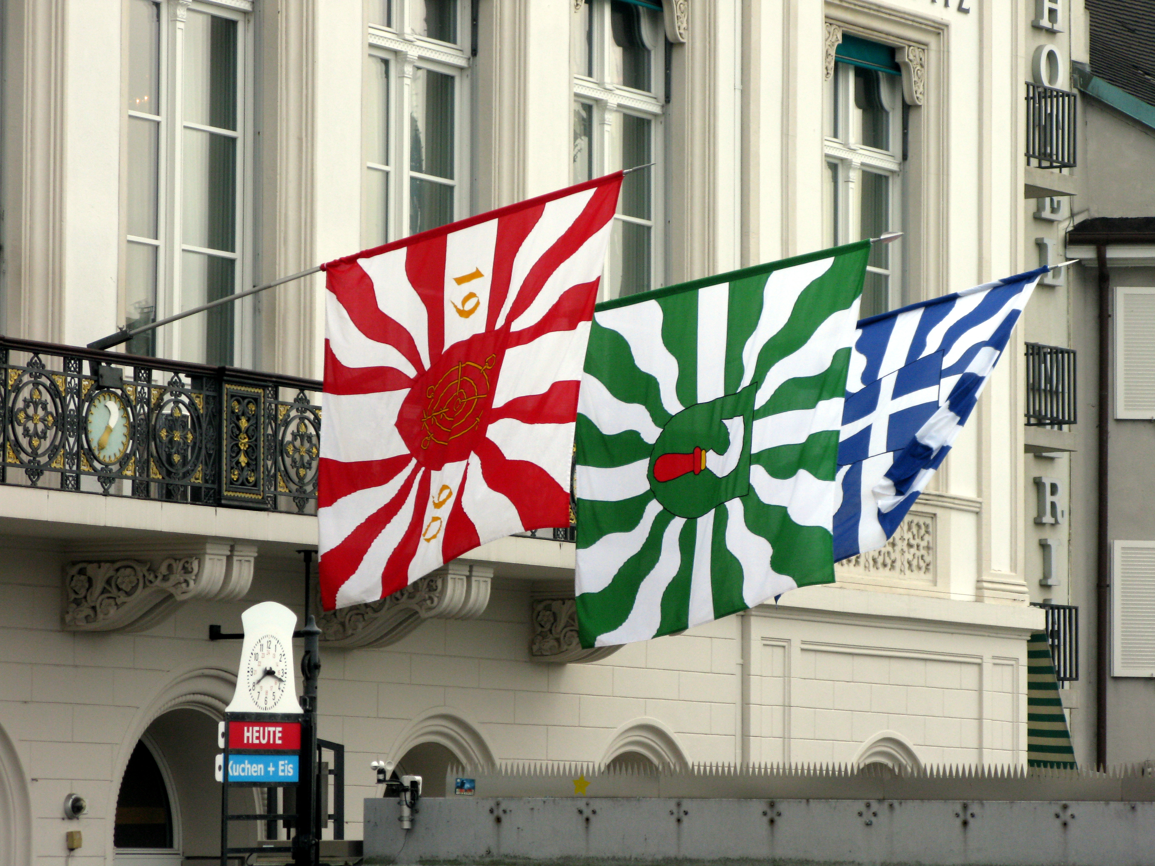 Vogel Gryff Tag in Klein-Basel, Flaggen der drei Ehrengesellschaften am Café Spitz